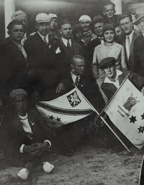 Wioślarze Klubu Wioślarskiego "Gryf" Bydgoszcz i Klubu Wioślarskiego z Roku 1904 (KW 04) Poznań - lata 30.XX w.